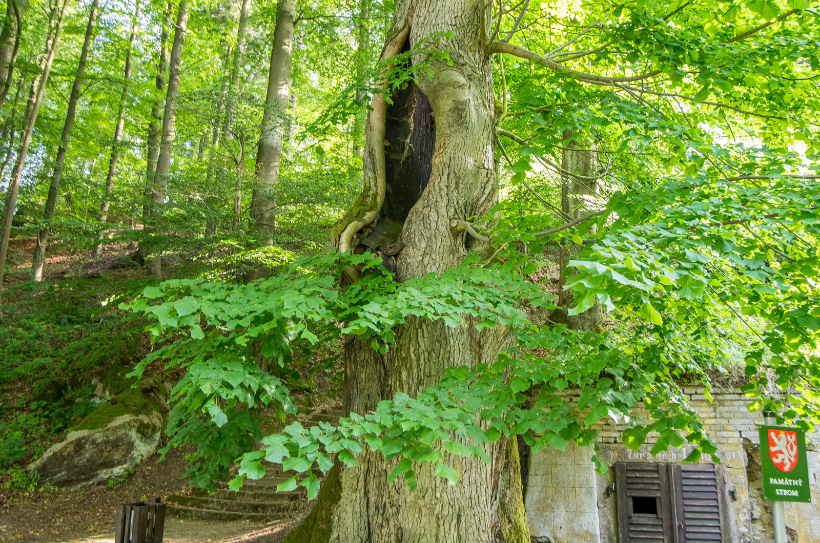 památný strom - Lípa u zámeckého pivovaru, Lázně Kynžvart, okres Cheb